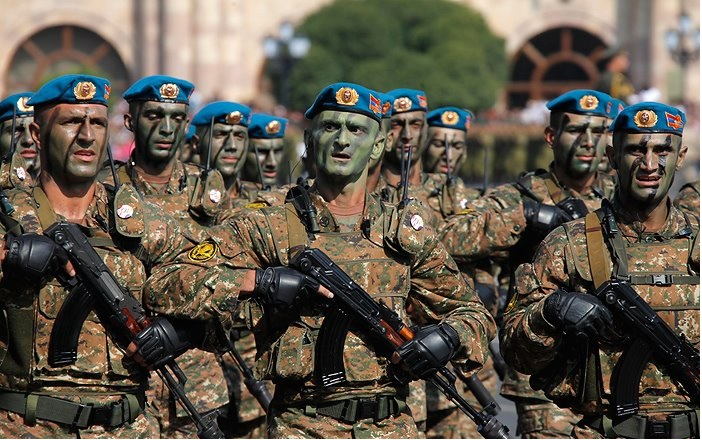 Спецназ Армении